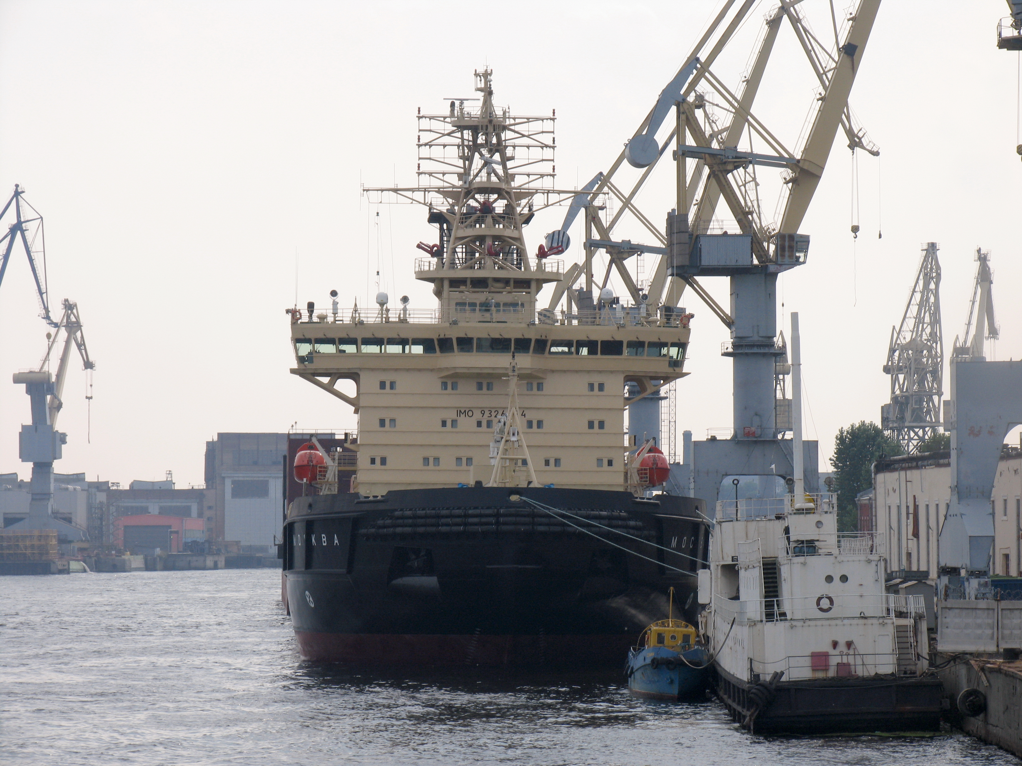 Ледокол "Москва" 2008 года выпуска.